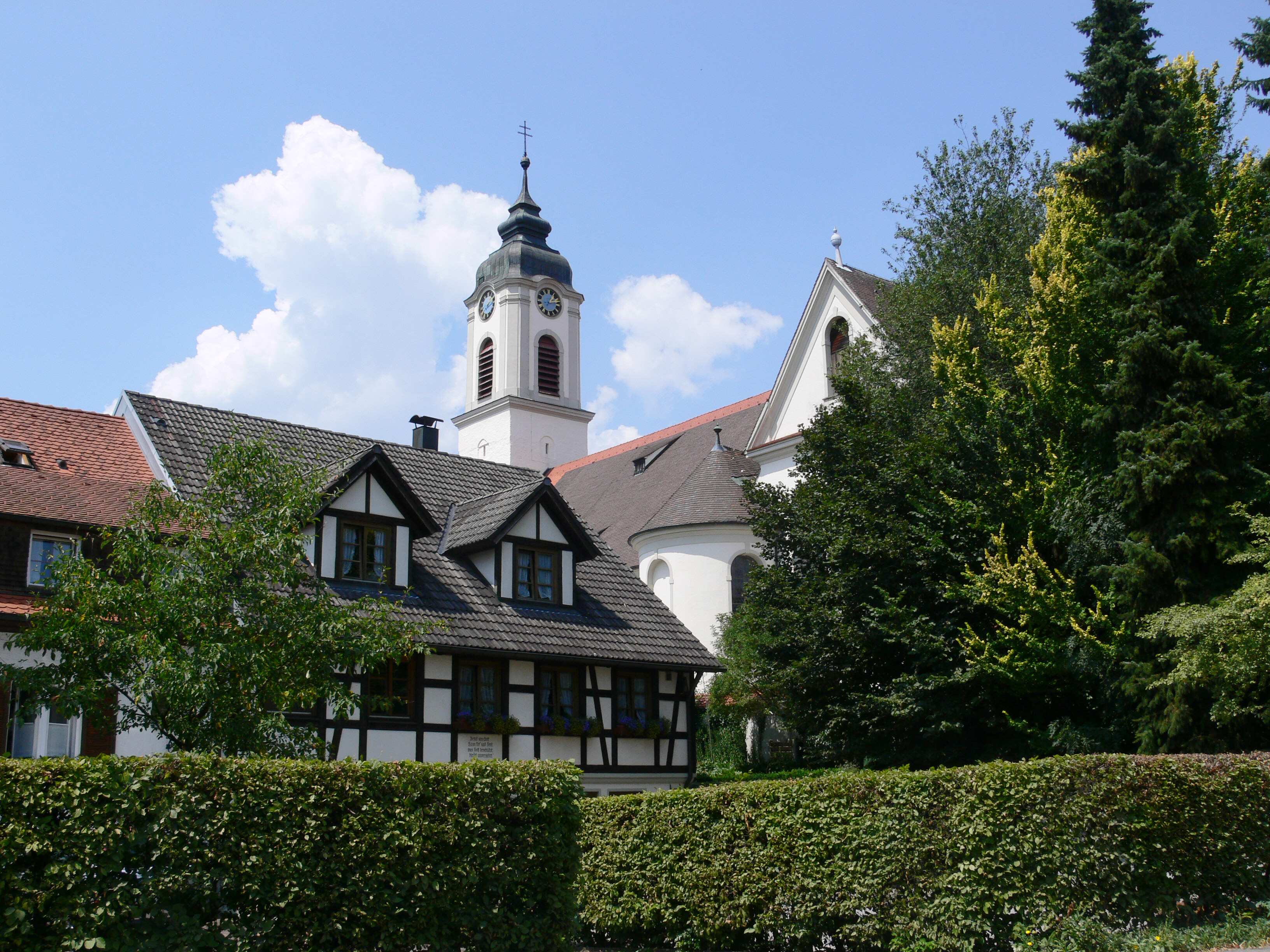 Pfarrkirche St. Gallus und Ulrich Kißlegg, Landkreis Ravensburg, Baden-Württemberg, Deutschland